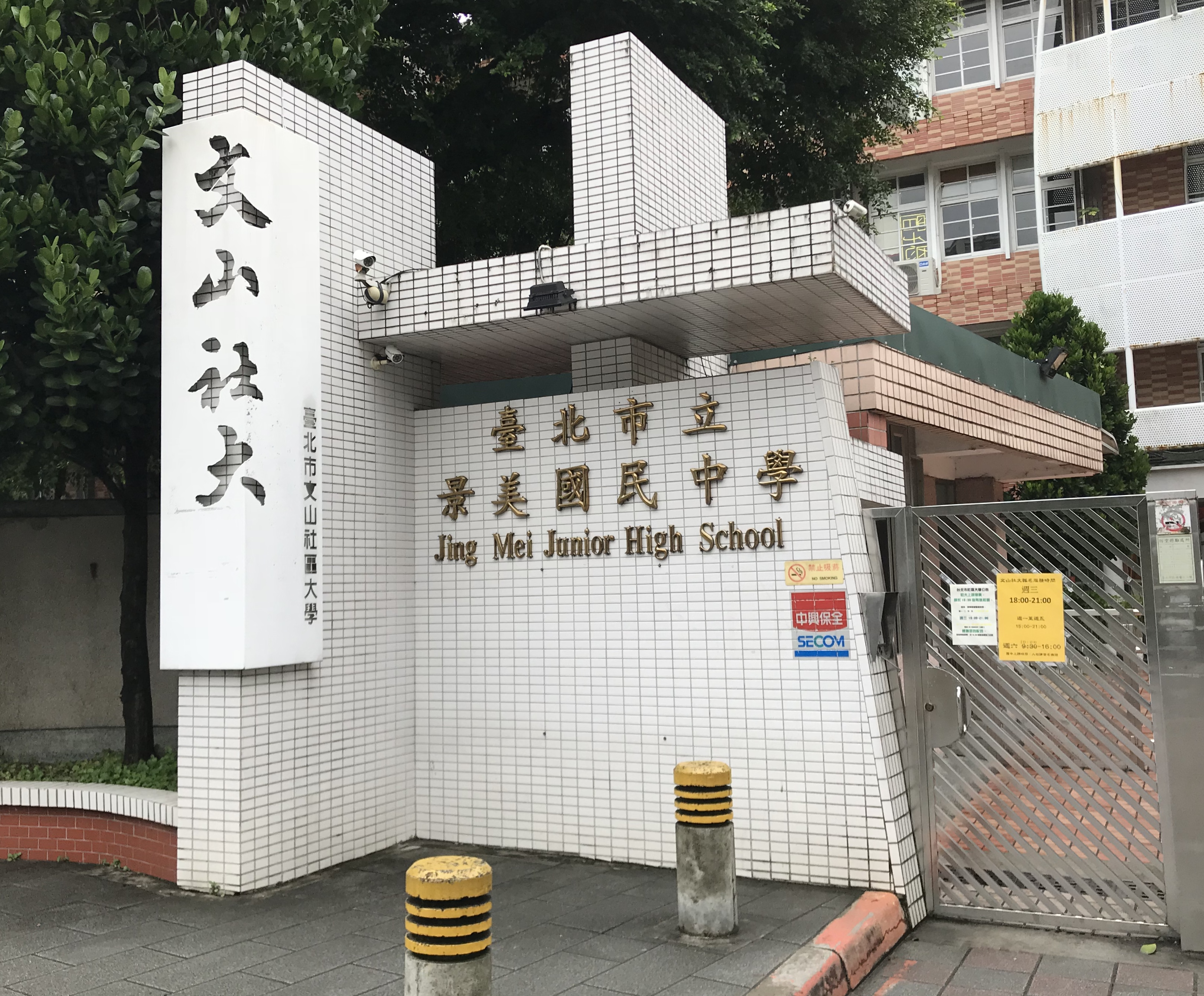 中文（台灣）: 臺北市文山社區大學，校本部位於臺北市立景美國民中學。